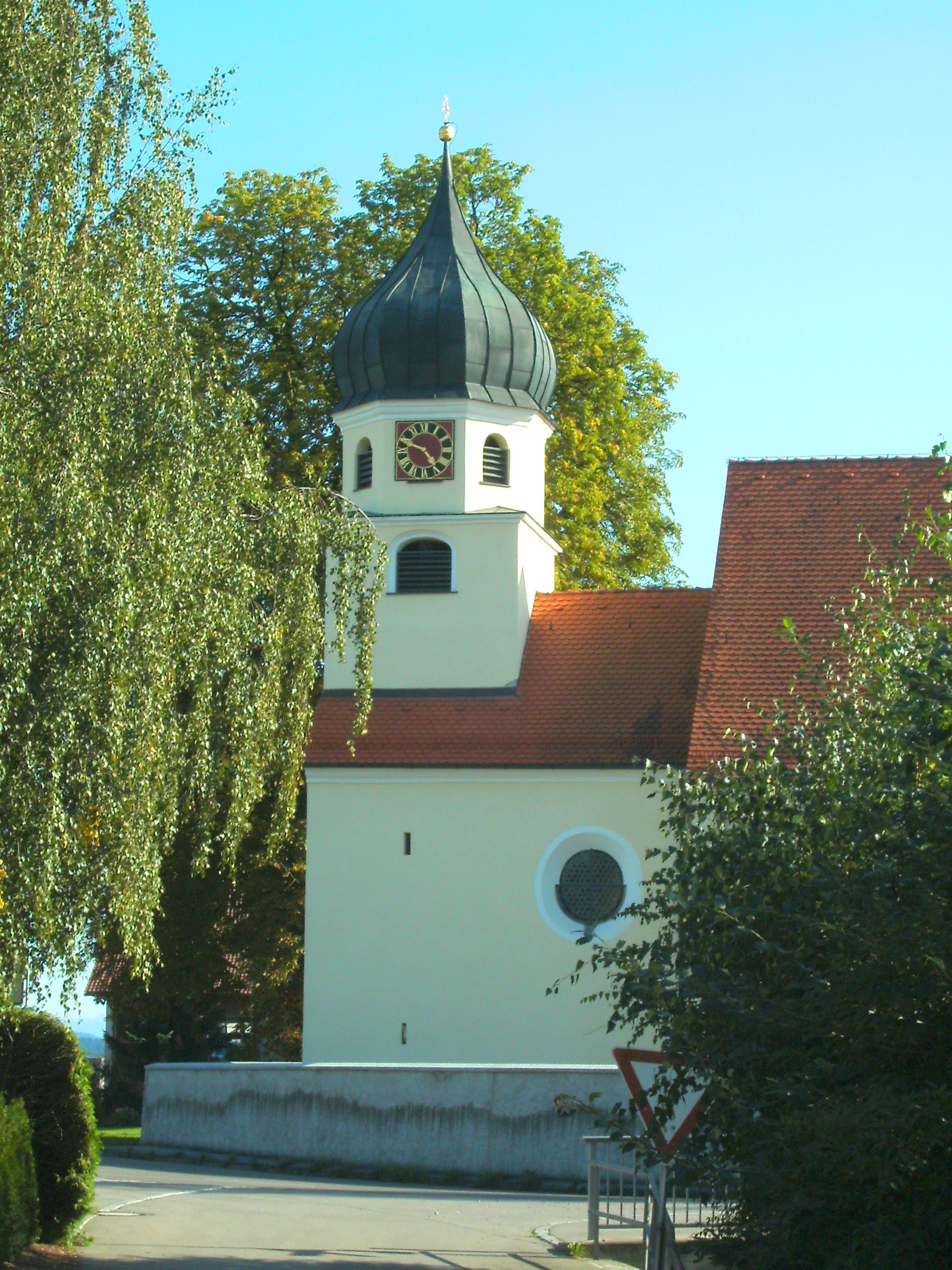 Kath. Filialkirche St. Josef, Illerbachen, Gemeinde Berkheim, Landkreis Biberach.